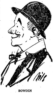 Le clown Bowden.